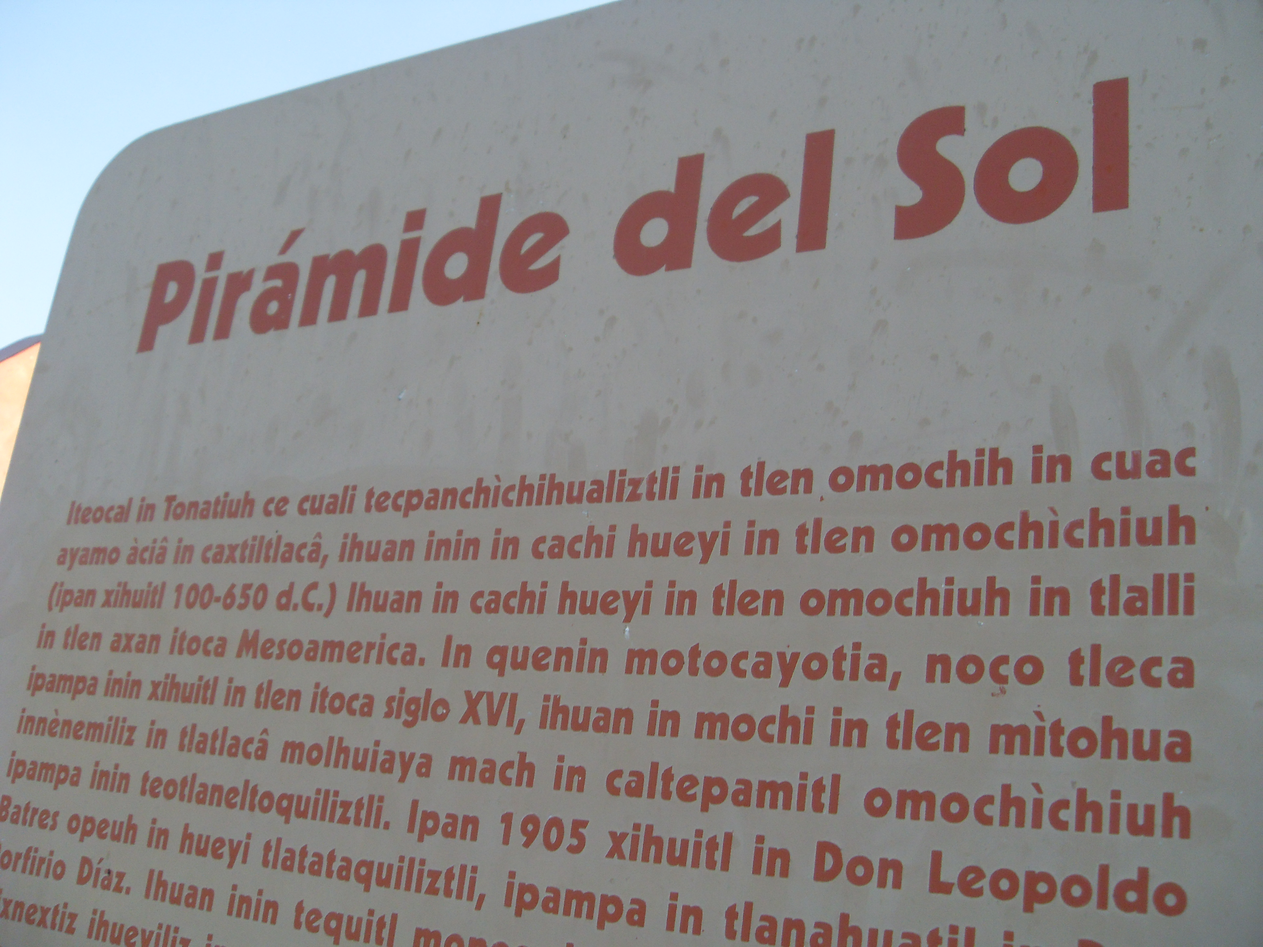 Tablica informacyjna w Teotihuacan w Meksyku